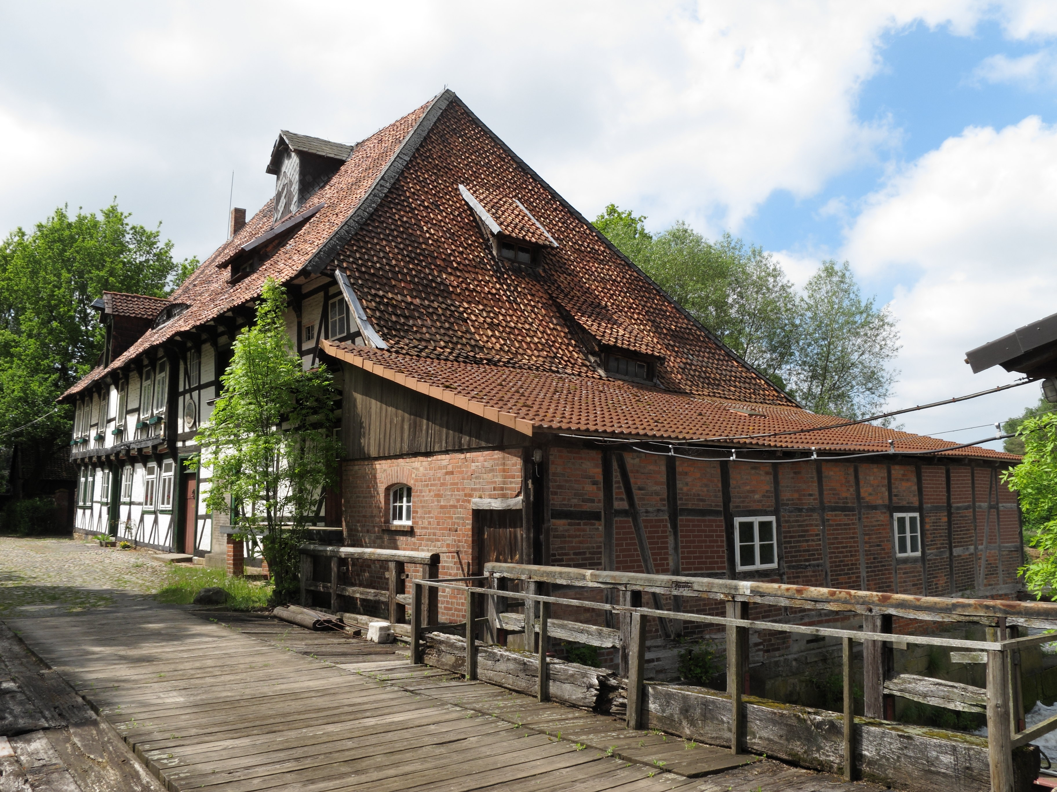 Wassermühle Rothemüle bei Schwülper. Erste Erwähnung 1348, diente sie abwechselnd als Getreide-, Öl- Schrot-, und Walkmühle. Heute dient sie der Stromerzeugung - Jahresproduktion: 120000kWh.